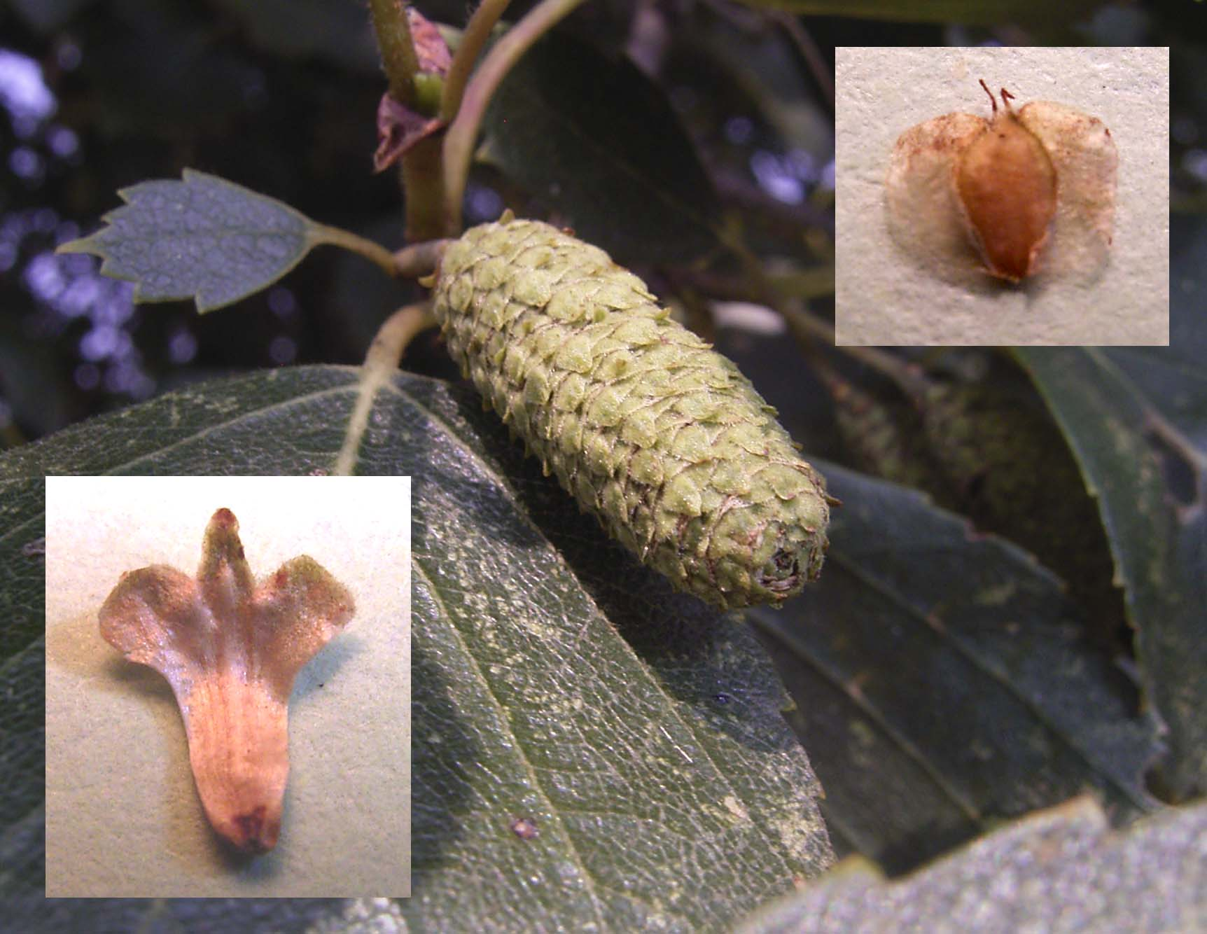 Fruchtstand der Moorbirke (Betula pubescens), Fruchtschuppe (links unten) und geflügelte Frucht (rechts oben)